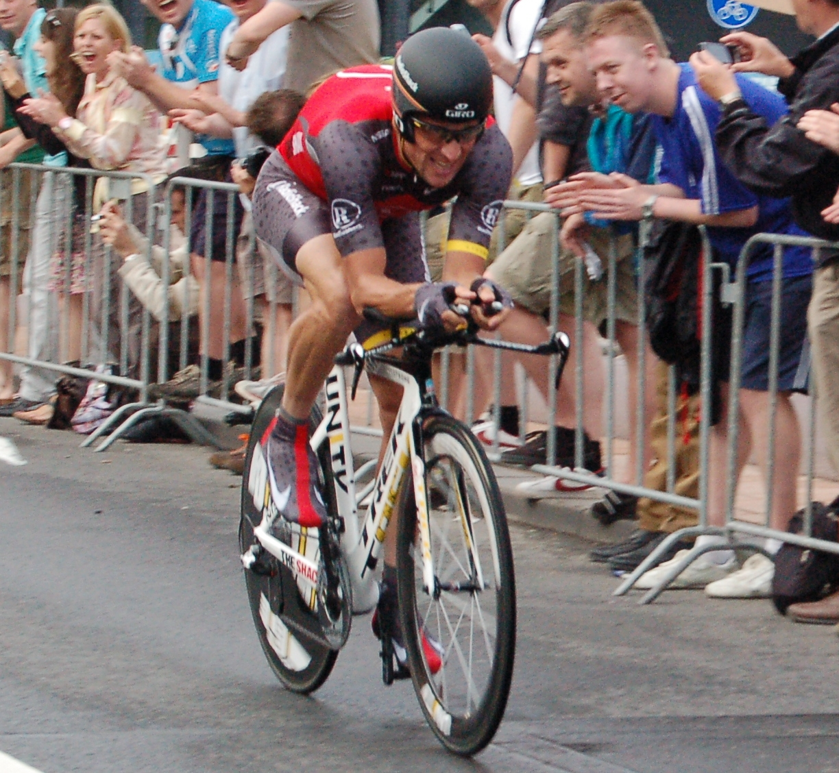 Prologue du Tour de France 2010 à Rotterdam - Lance Armstrong